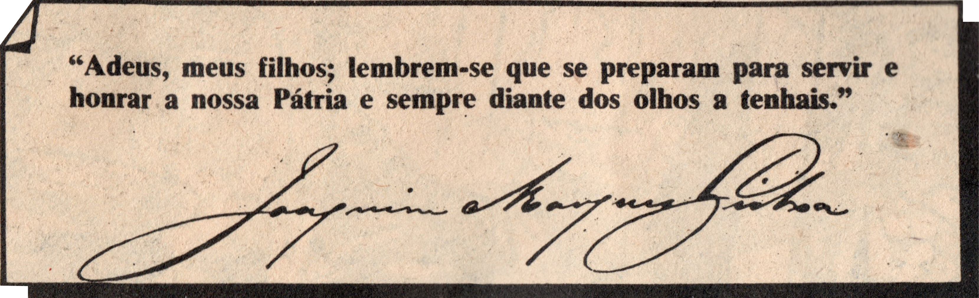 Assinatura do militar brasileiro, Joaquim Marques Lisboa, na edição nº 3 da revista Grandes Figuras em Quadrinhos, de 1957.